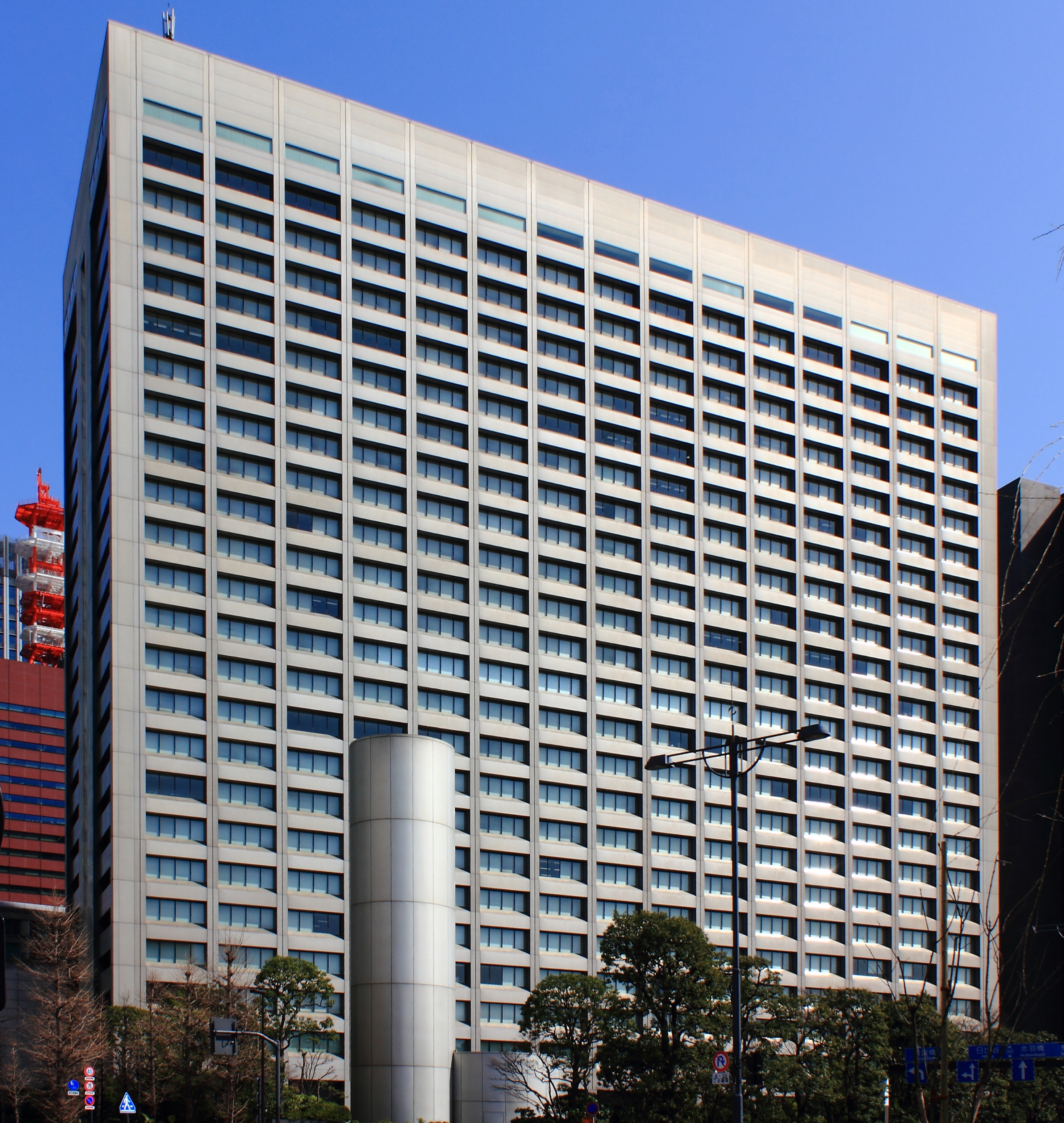 三井物産本社（東京都千代田区）